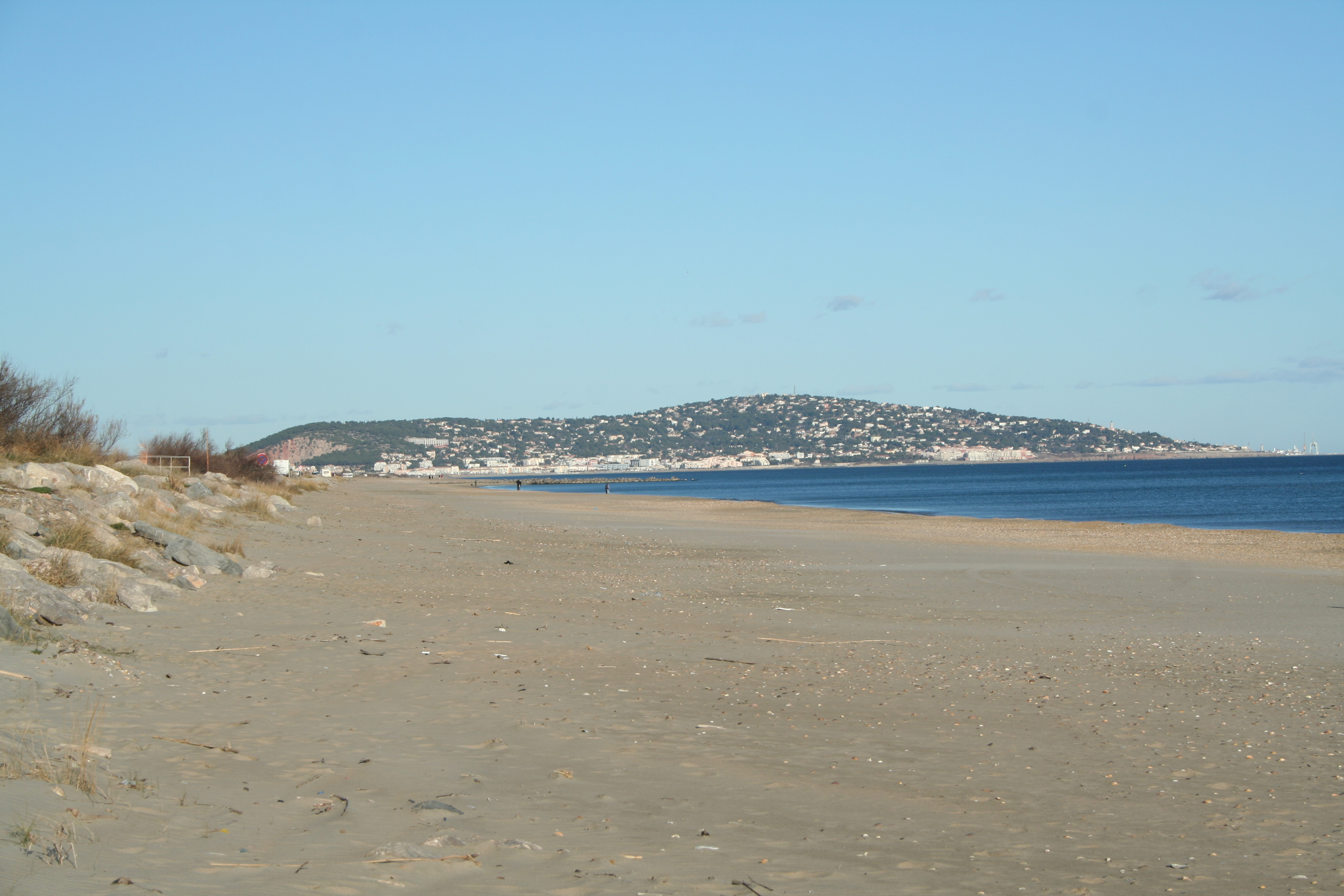 Sète (Hérault) - Vue sur la ville depuis la plage de la Corniche.